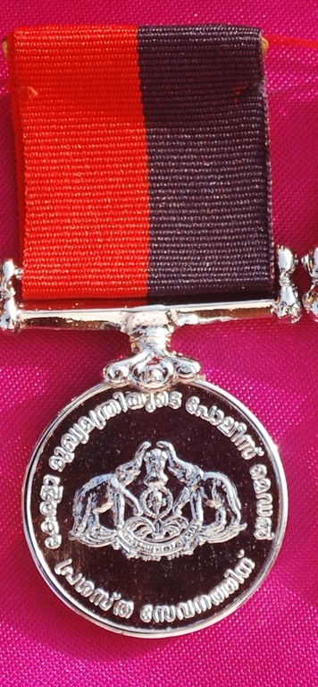 കേരള മുഖ്യമന്ത്രി പോലീസ് സേനയിലെ സ്തുത്യര്‍ഹമായ പ്രവര്‍ത്തനത്തിന് നല്‍കുന്ന മെഡല്‍